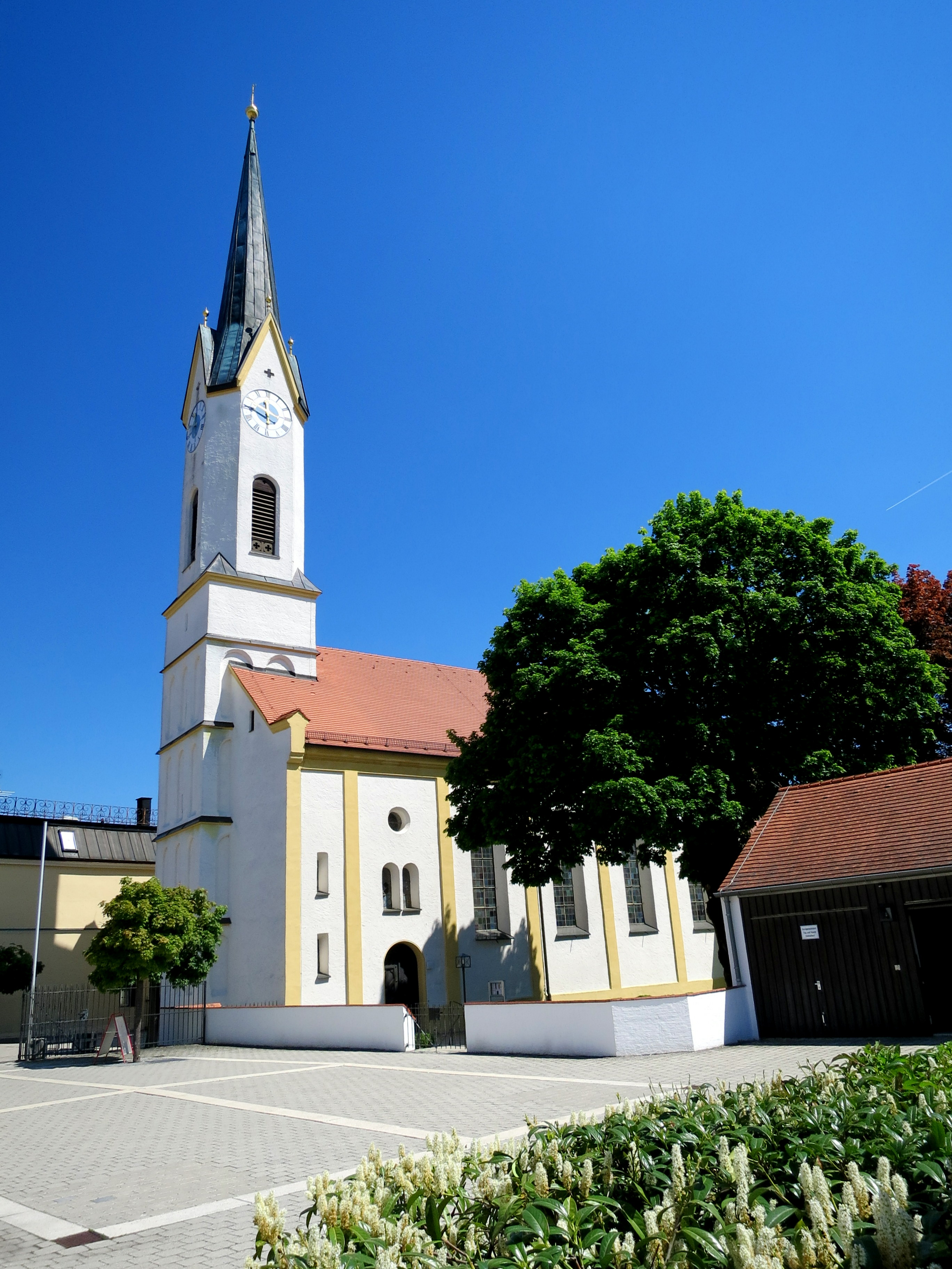 Der neugotische Saalbau mit eingezogenem Polygonalchor und angefügter zweigeschossiger Sakristei wurde1865 errichtet.